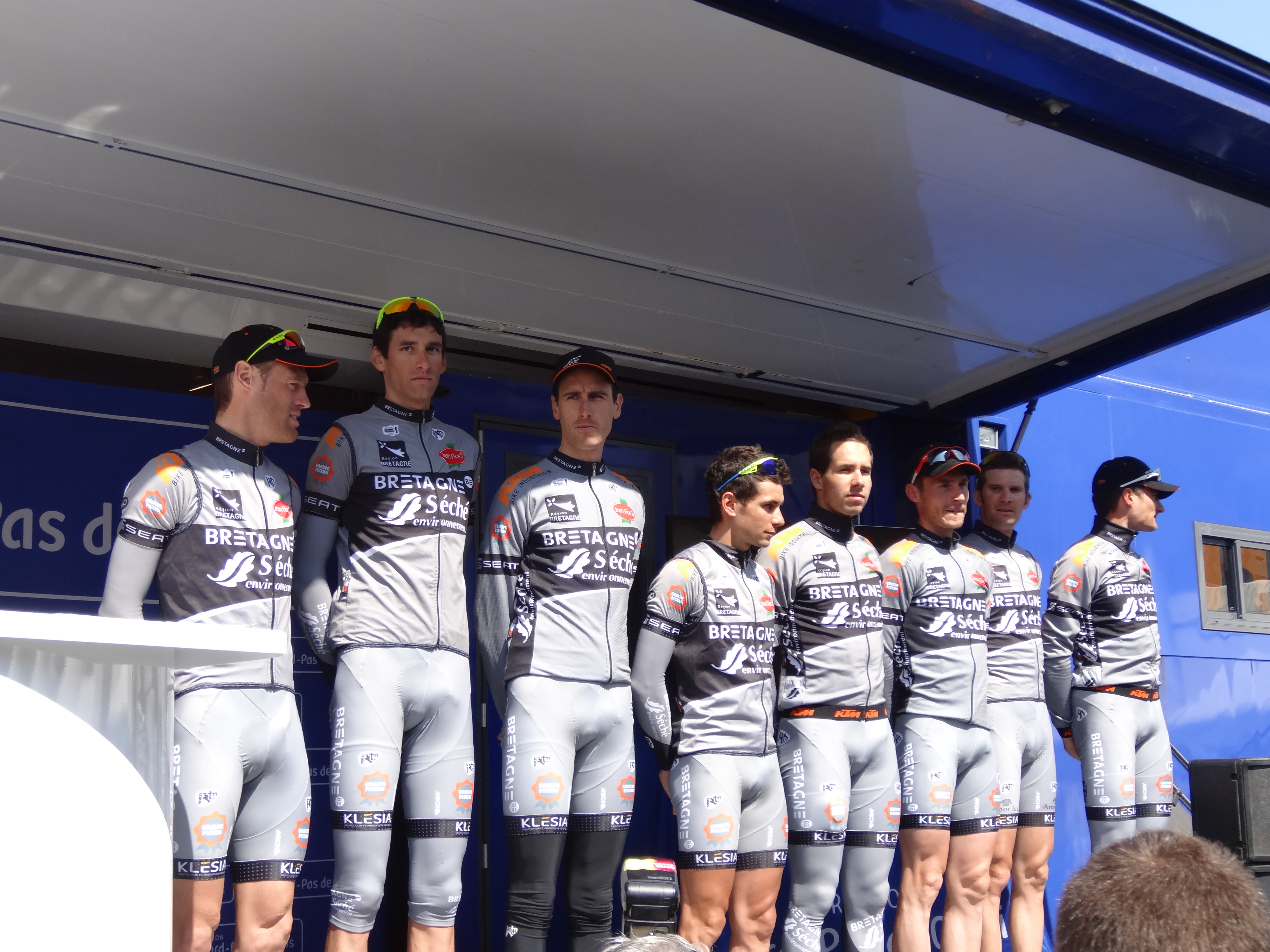 Reportage photographique réalisé le mercredi 1er mai 2013 au départ de la première étape de l'édition 2013 des Quatre jours de Dunkerque à Dunkerque, Nord, Nord-Pas-de-Calais, France. Le dossier photographique montre des véhicules de course exposés, la caravane publicitaire, la présentation des coureurs, et le départ. Depicted people: Arnaud Gérard, Florian Guillou, Jean-Marc Bideau, Armindo Fonseca, Benoît Jarrier, Florian Vachon, Geoffroy Lequatre and Gaël Malacarne